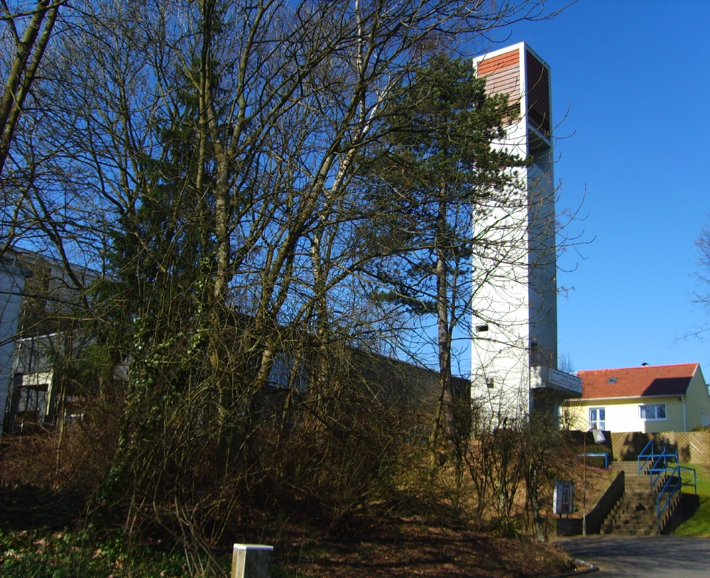 Evangelische Kirche, Wuppertal-Hatzfeld